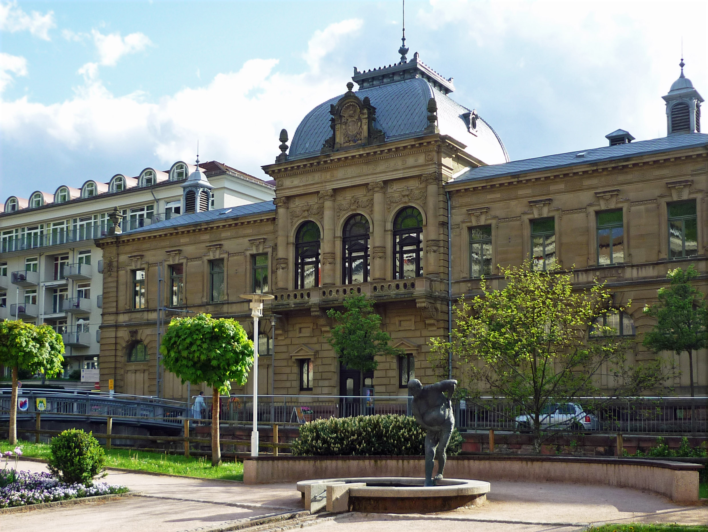 Bad Wildbad, Lkr. Calw (Württemberg) – König-Karls-Bad mit Rossini-Skulptur